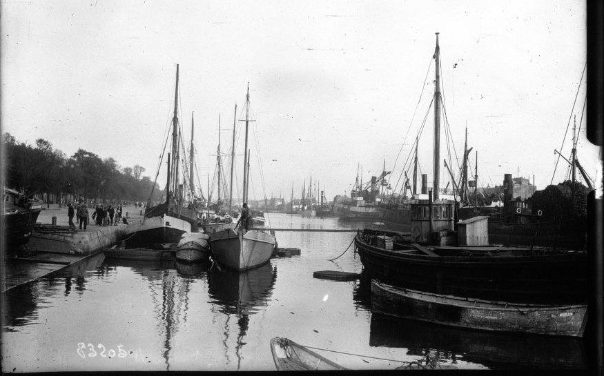 Vue du bassin de Lorient dans les années 1920